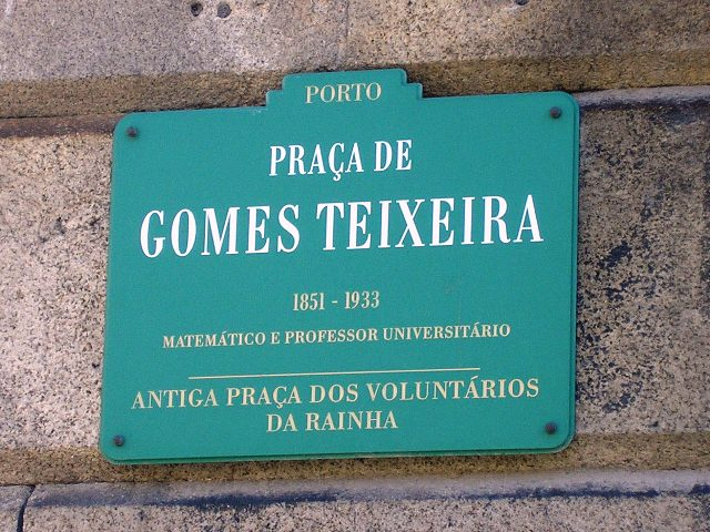 "Gomes Teixeira" square sign in Porto, Portugal.